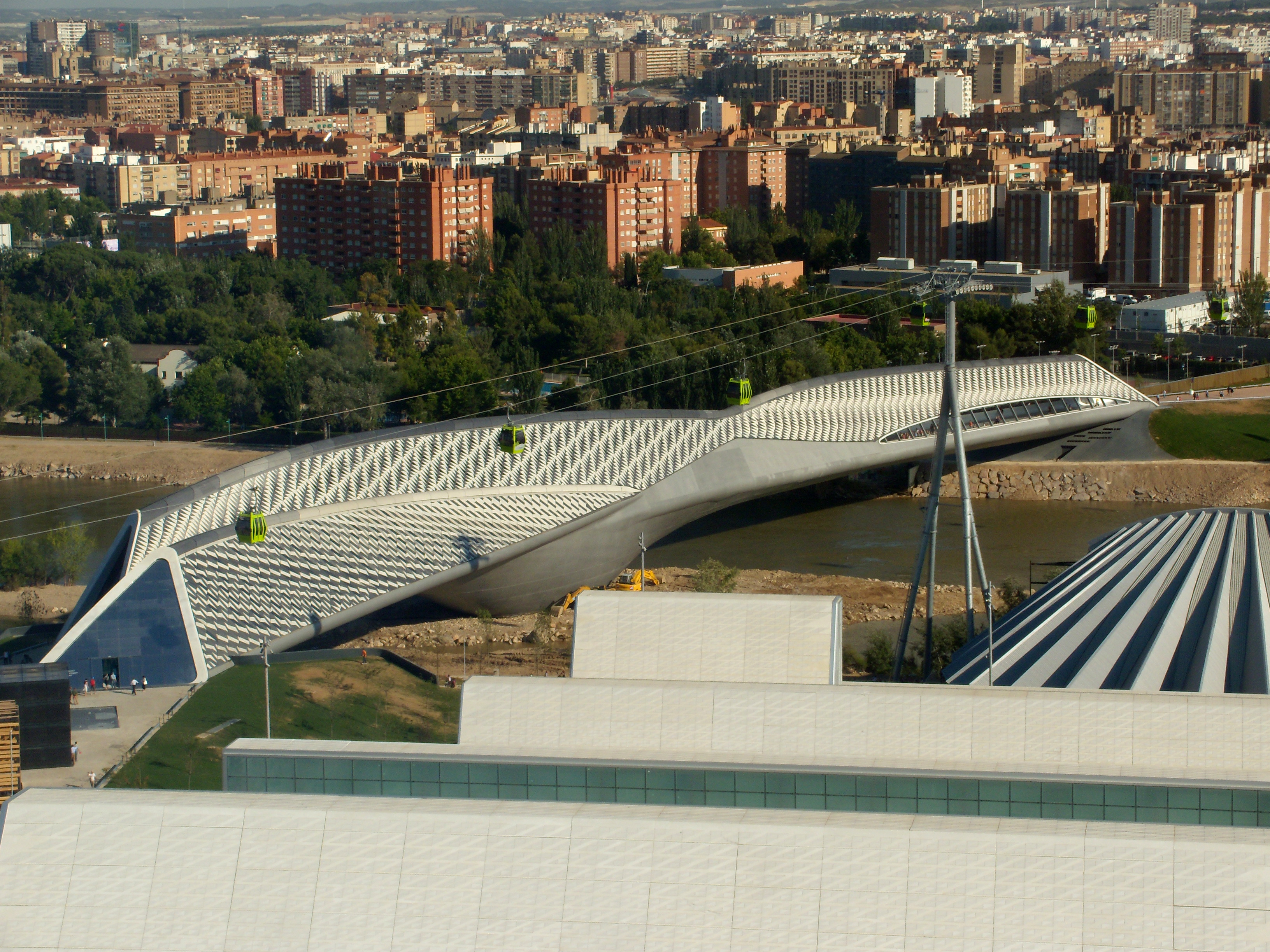 Expo Zaragoza 2008 : Pabellón-Puente visto de la Torre del Agua